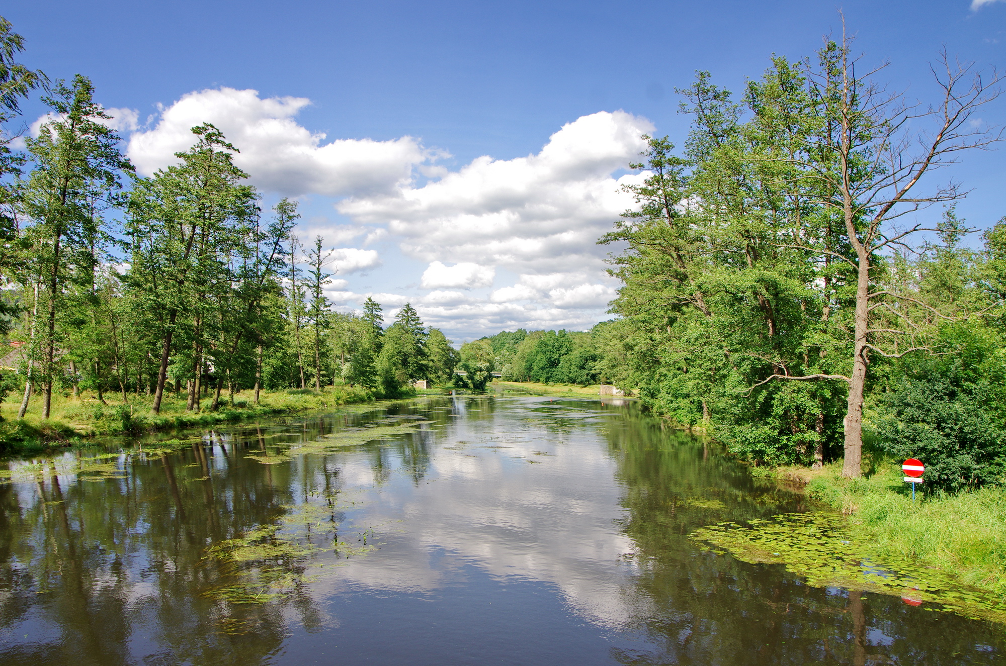 Evropsky významná lokalita Ramena Ohře v Kynšperku nad Ohří, okres Sokolov